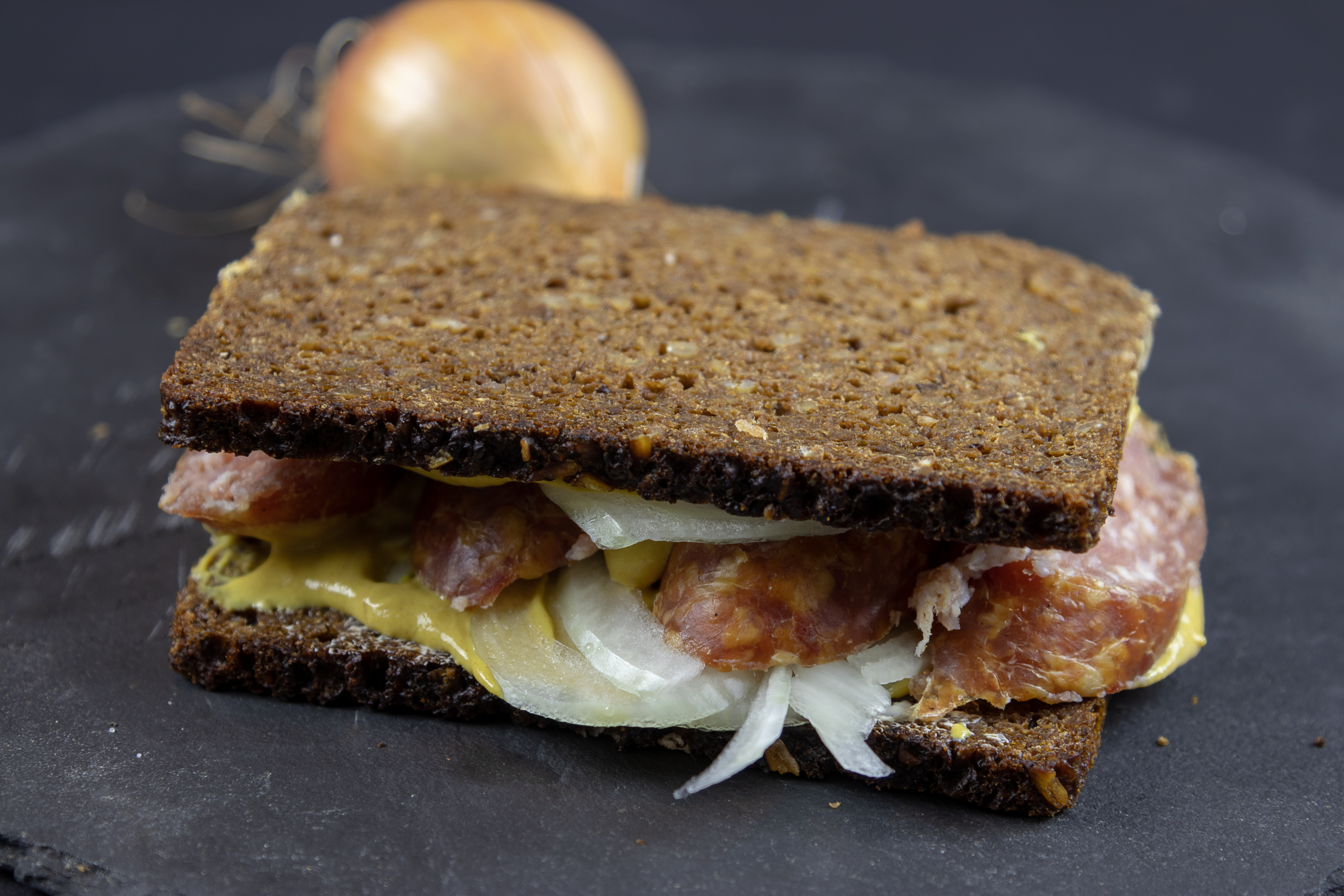 Kottenbutter mit Kottenwurst, Zwiebel, Nutter, Senf, Vollkornbrot